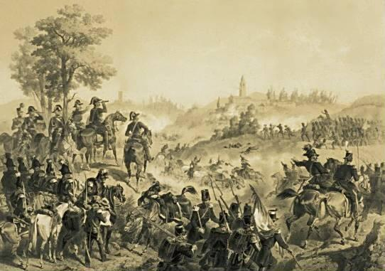 Il comando piemontese alla Battaglia di Pastrengo, ridotto, ritoccato, litografia